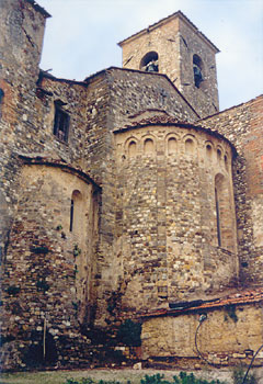 Pieve di San Pancrazio - Abside Comune di San Casciano in Val di Pesa Foto personale quindi priva di copyright